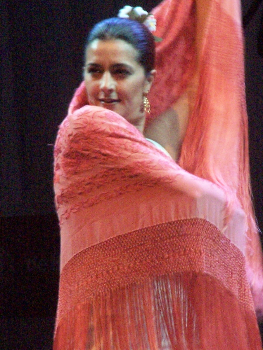 Bailaora.